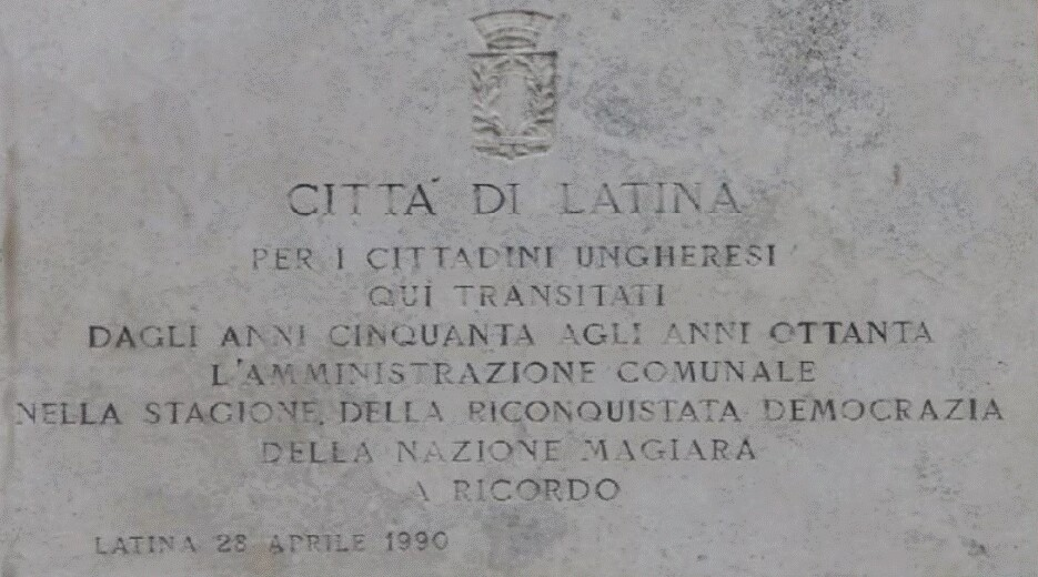 Lapide in memoria degli ungheresi transitati presso il campo profughi di Latina